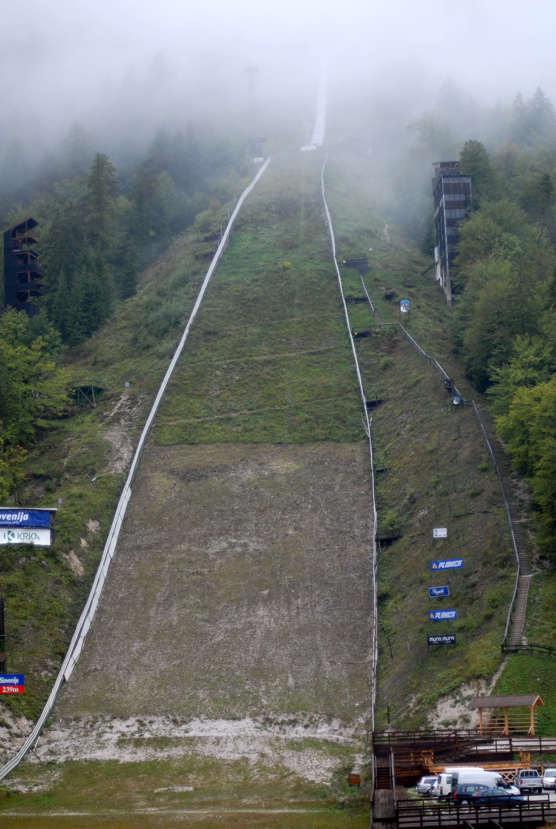 Ski-jump at Planica, Kranjska Gora, Slovenija